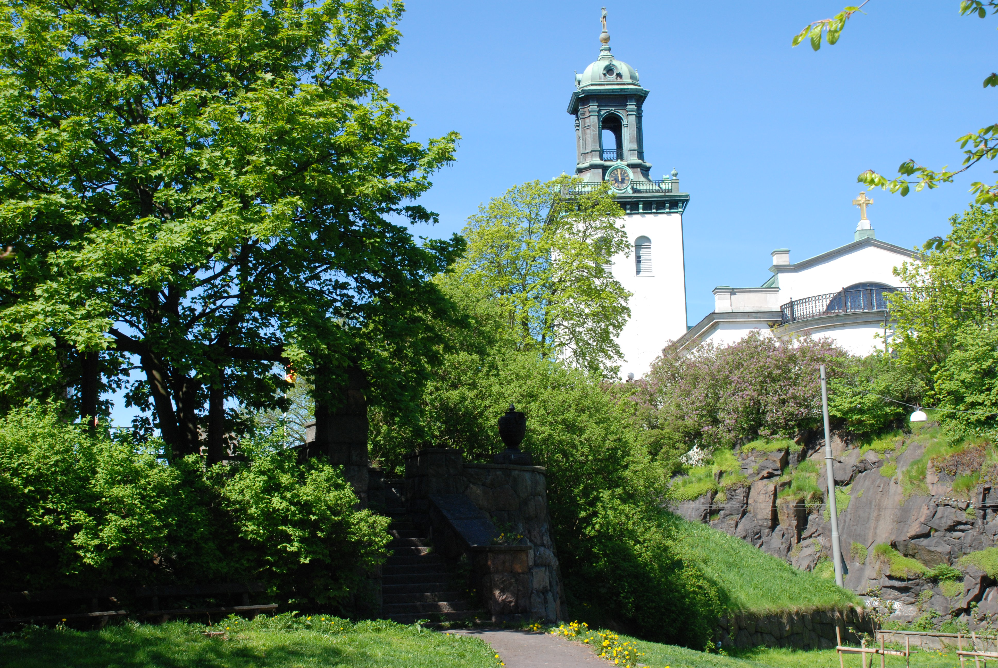 Bataljonsparken vid Allmänna Vägen/Karl Johansgatan i Majorna, Göteborg. I bakgrunden Carl Johans kyrka.